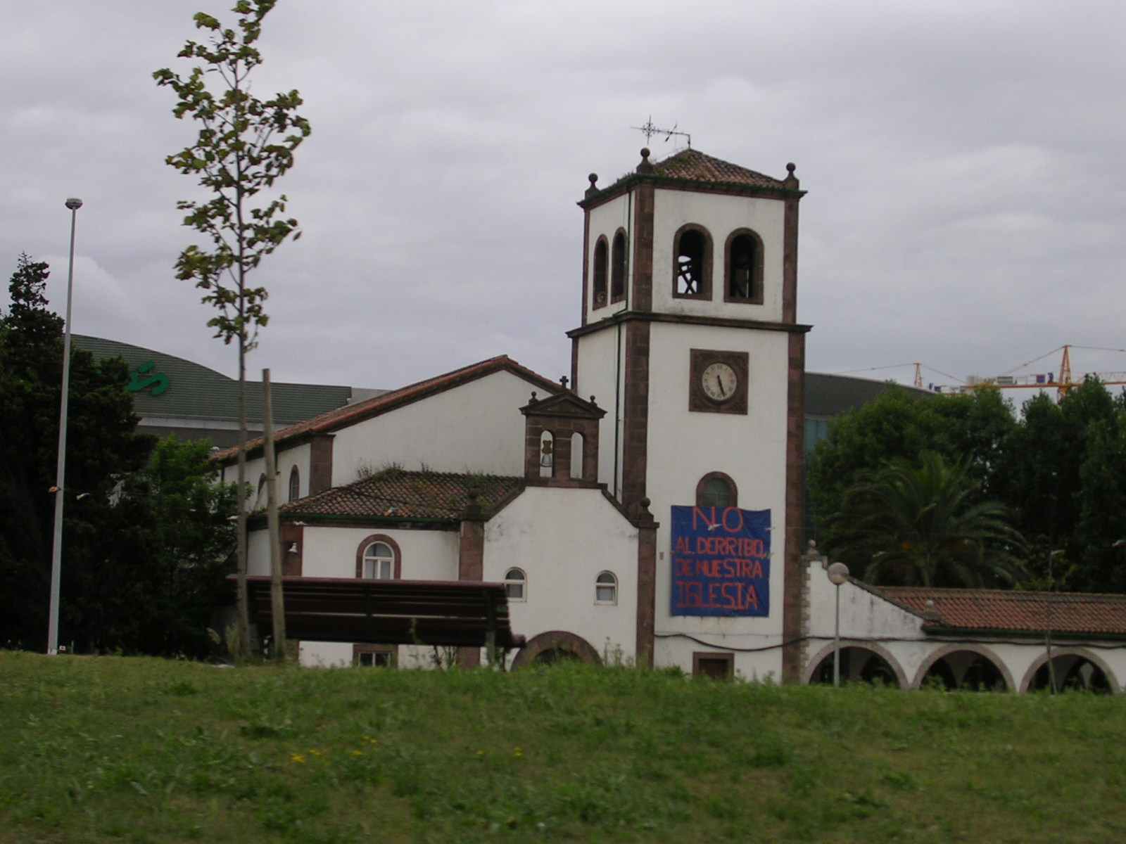 Antigua iglesia de Nueva Montaña, derribada en 2005